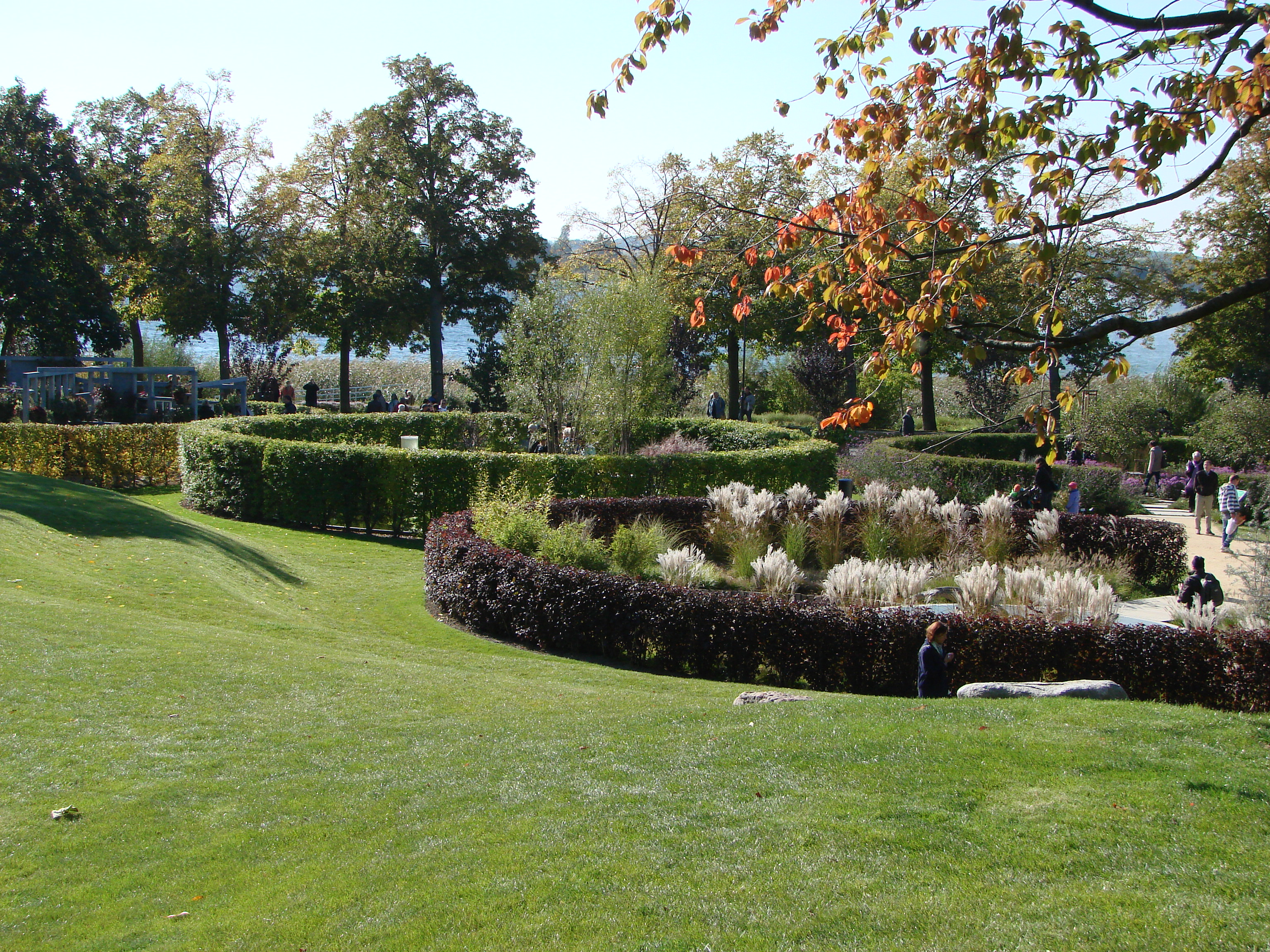 Landesgartenschau Prenzlau 2013, mehrere Themengärten